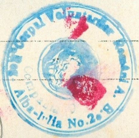 Ștampila Regimentului Nr. 2 Alba-Iulia din Corpul Voluntarilor Români Ardeleni-Bucovineni